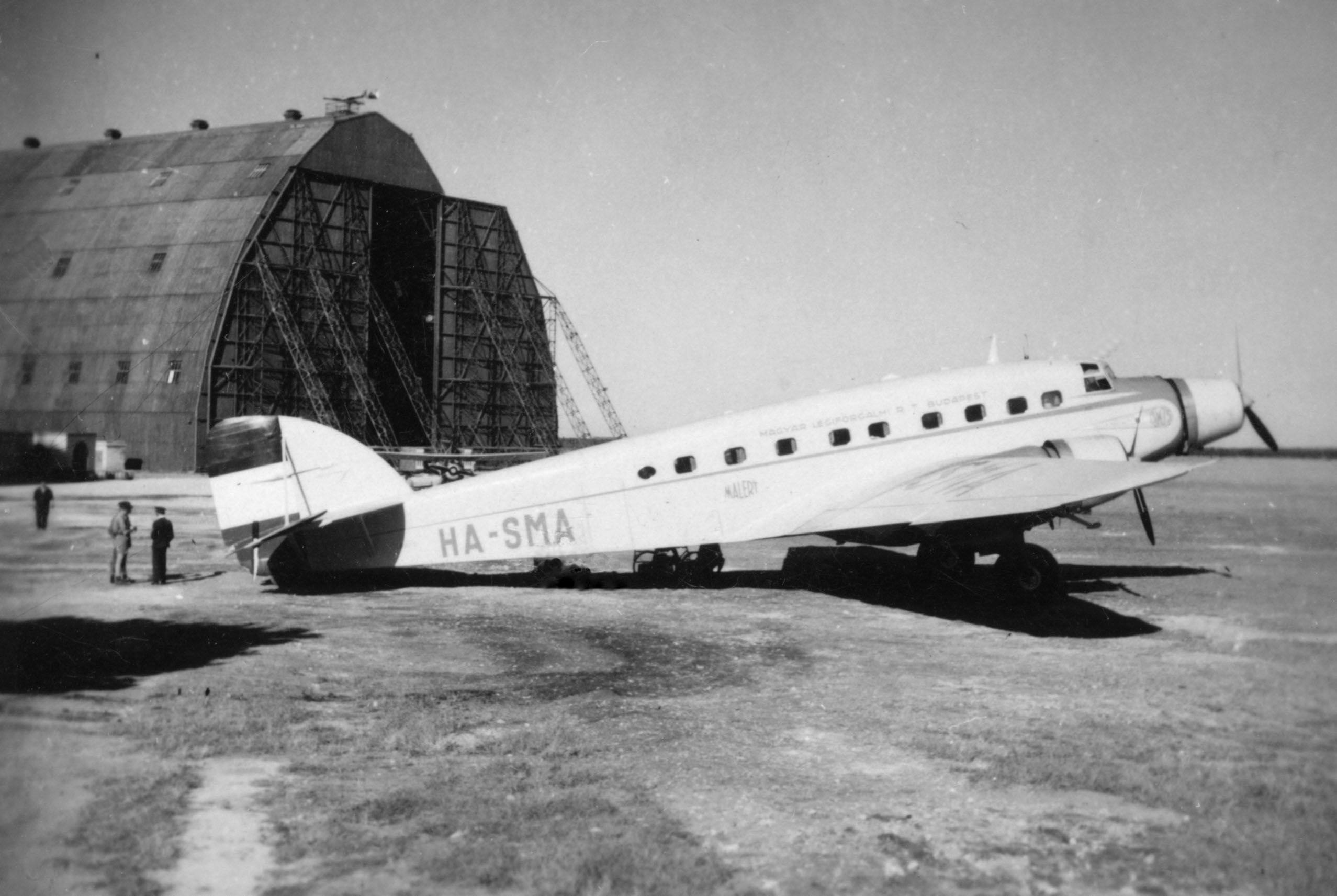 Olaszország Grottaglie repülőtér, a Malert Savoia - Marchetti SM-75 utasszállító repülőgépe 1939